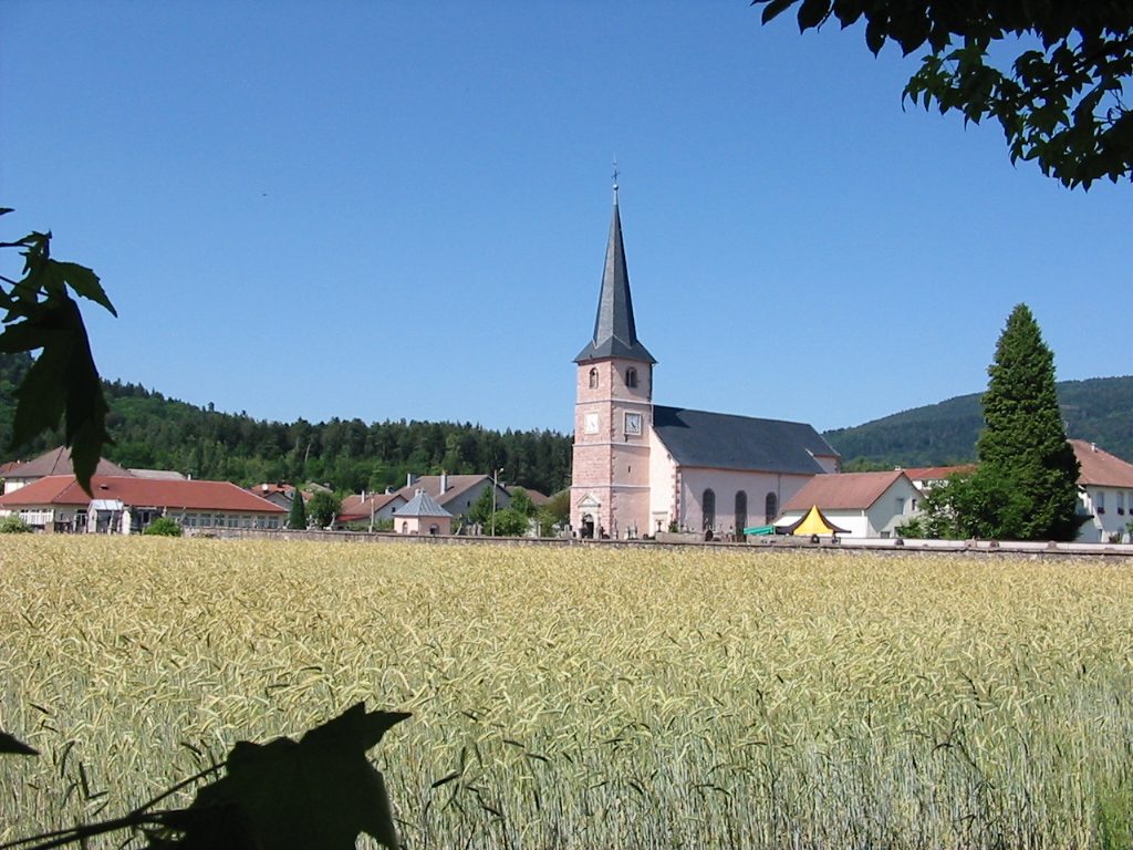 Saint-Amé Commune du canton de Remiremont (Vosges) Photo personnelle du 1er juillet 2006. Copyright © Christian Amet